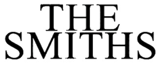 Logo de la banda